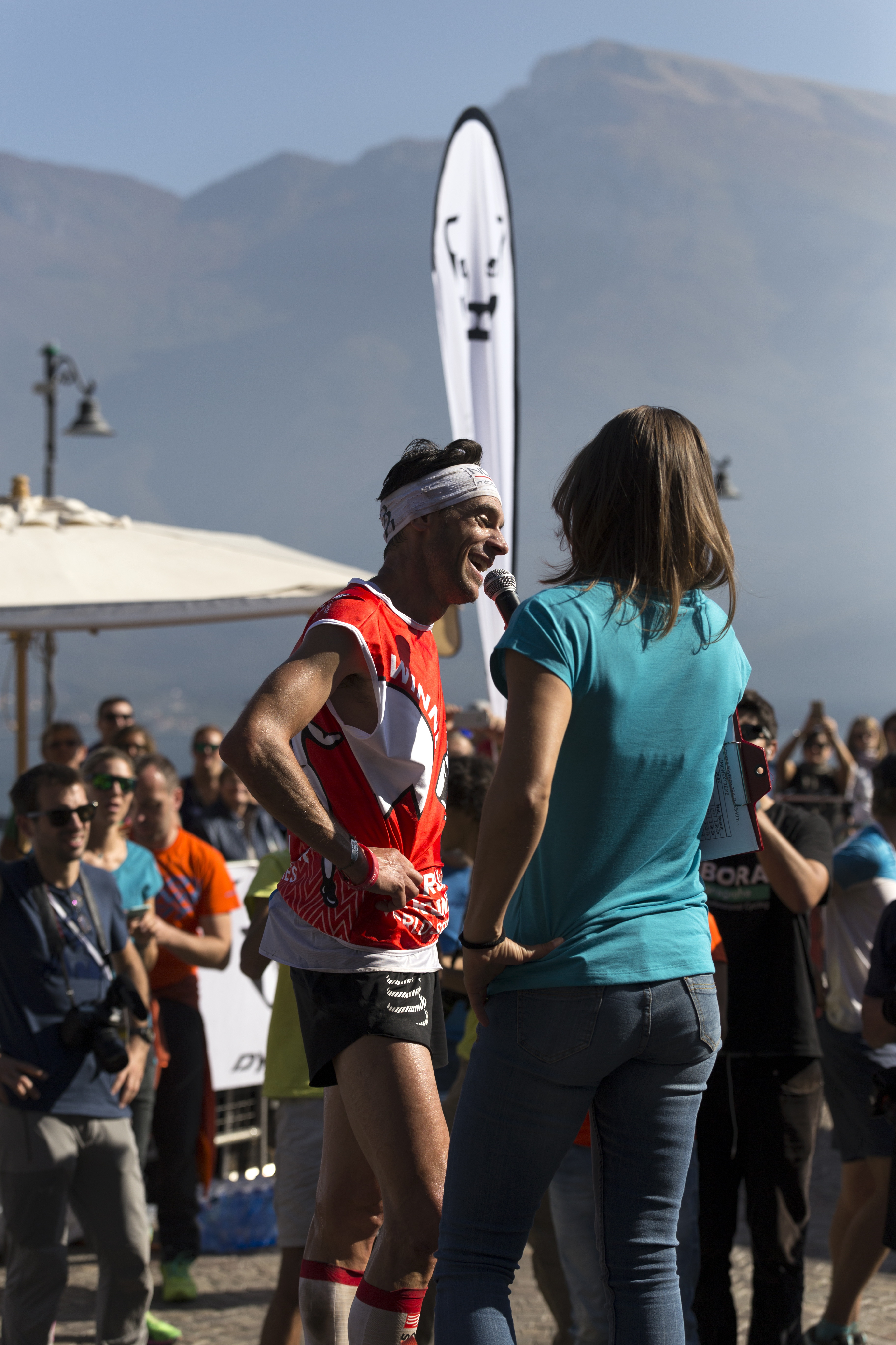 In Limone sul Garda (ITA)